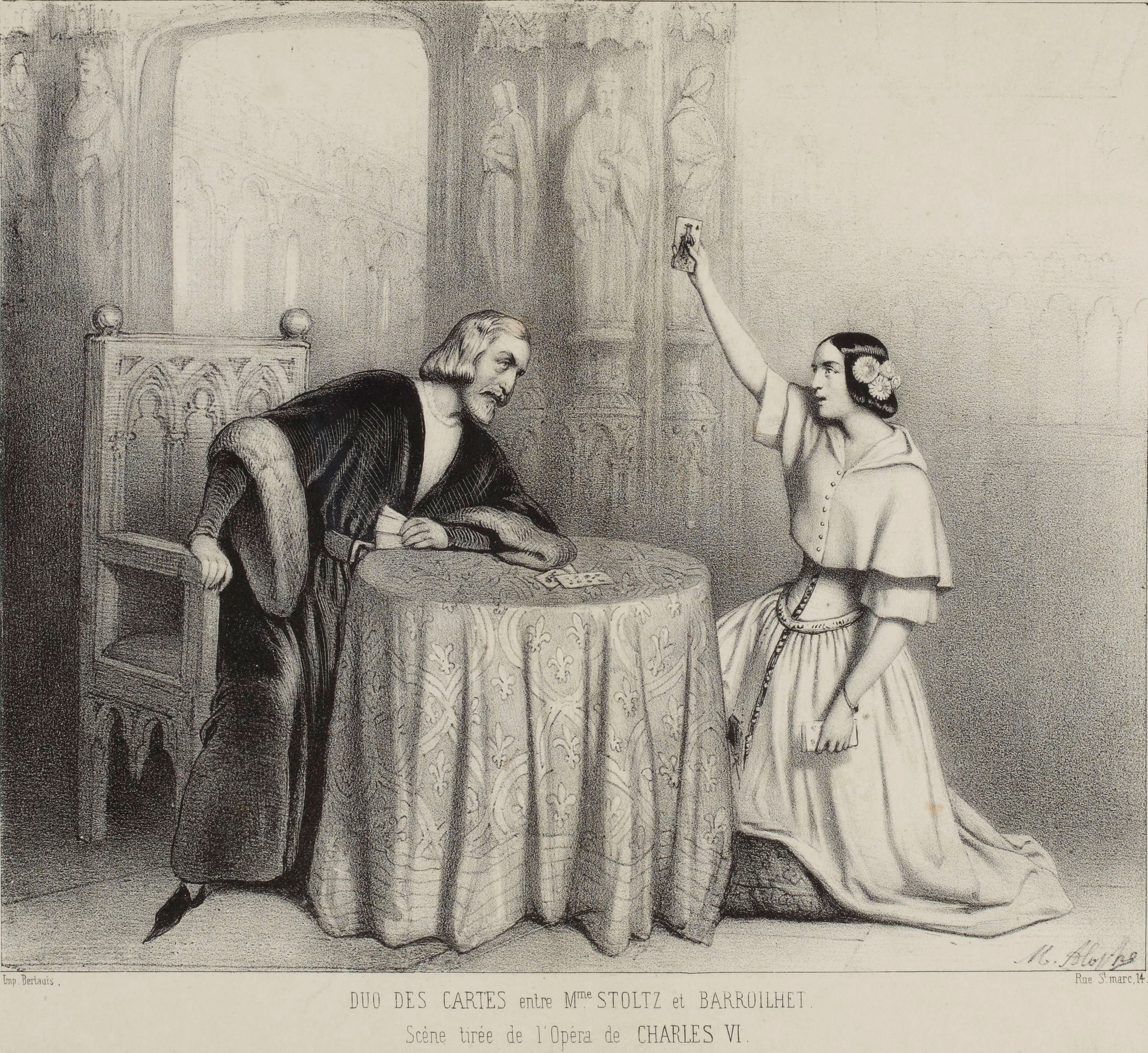 Duo des cartes de l'acte II de Charles VI, opéra de J.F. Halévy, avec R. Stoltz dans le rôle d'Odette et P. Barroilhet dans celui de Charles VI